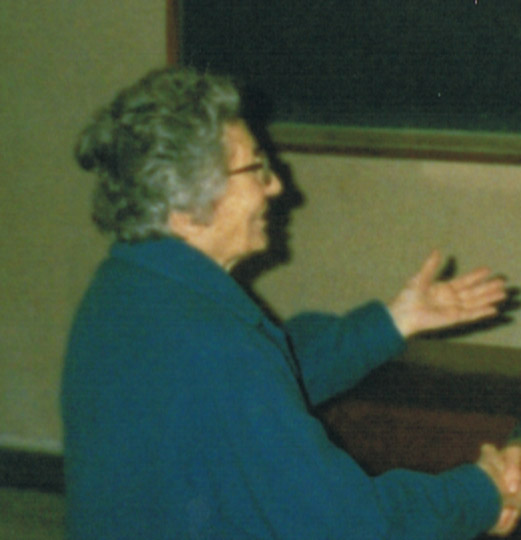 Profesoressa Nella Filippi durante la discussione di un dottorato.